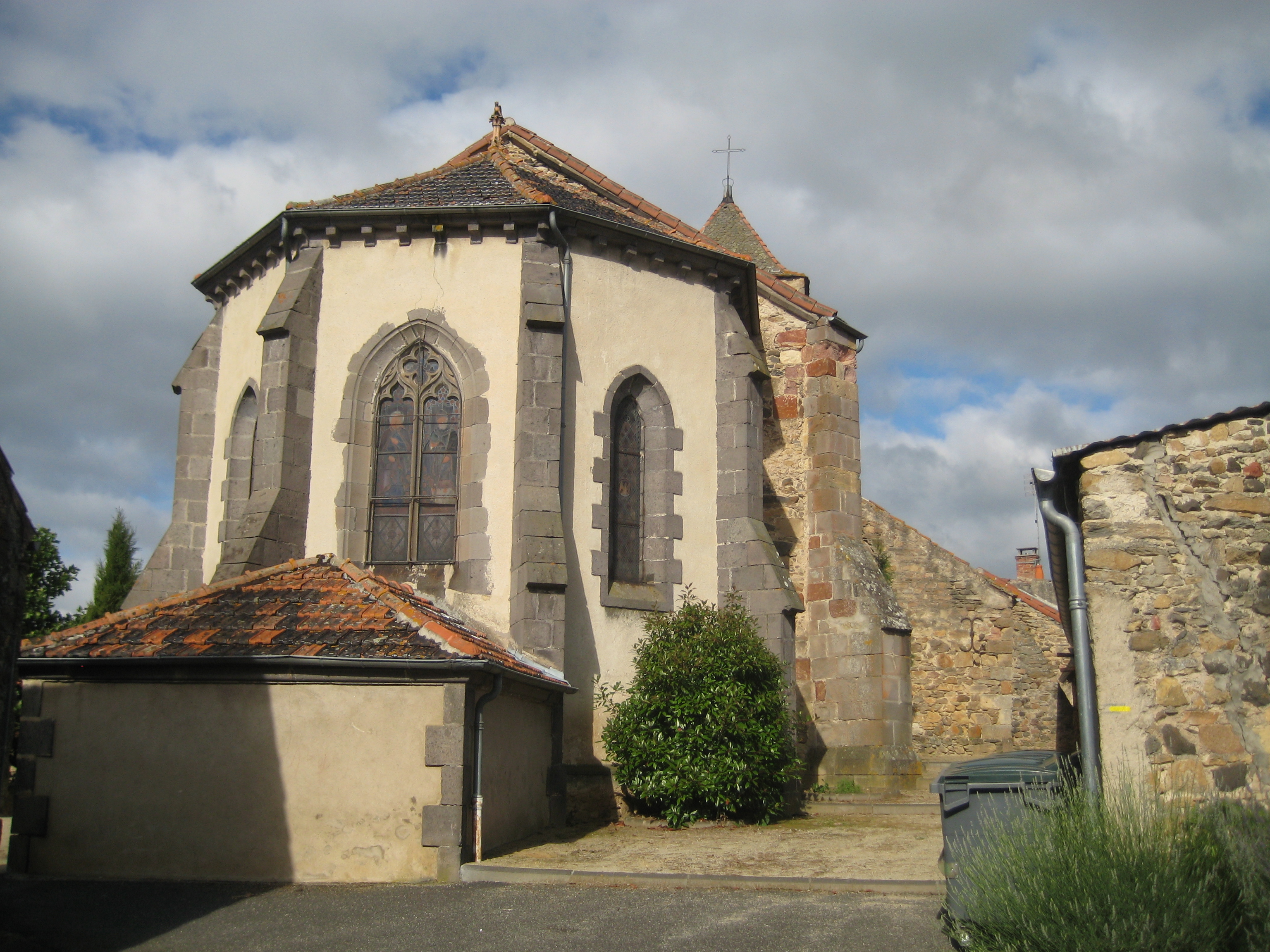 Église d'Apchat